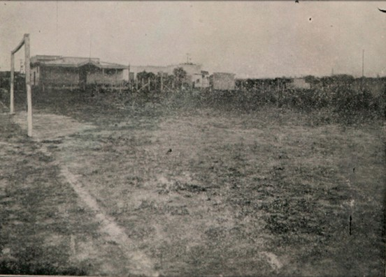 campo de velez en 1916